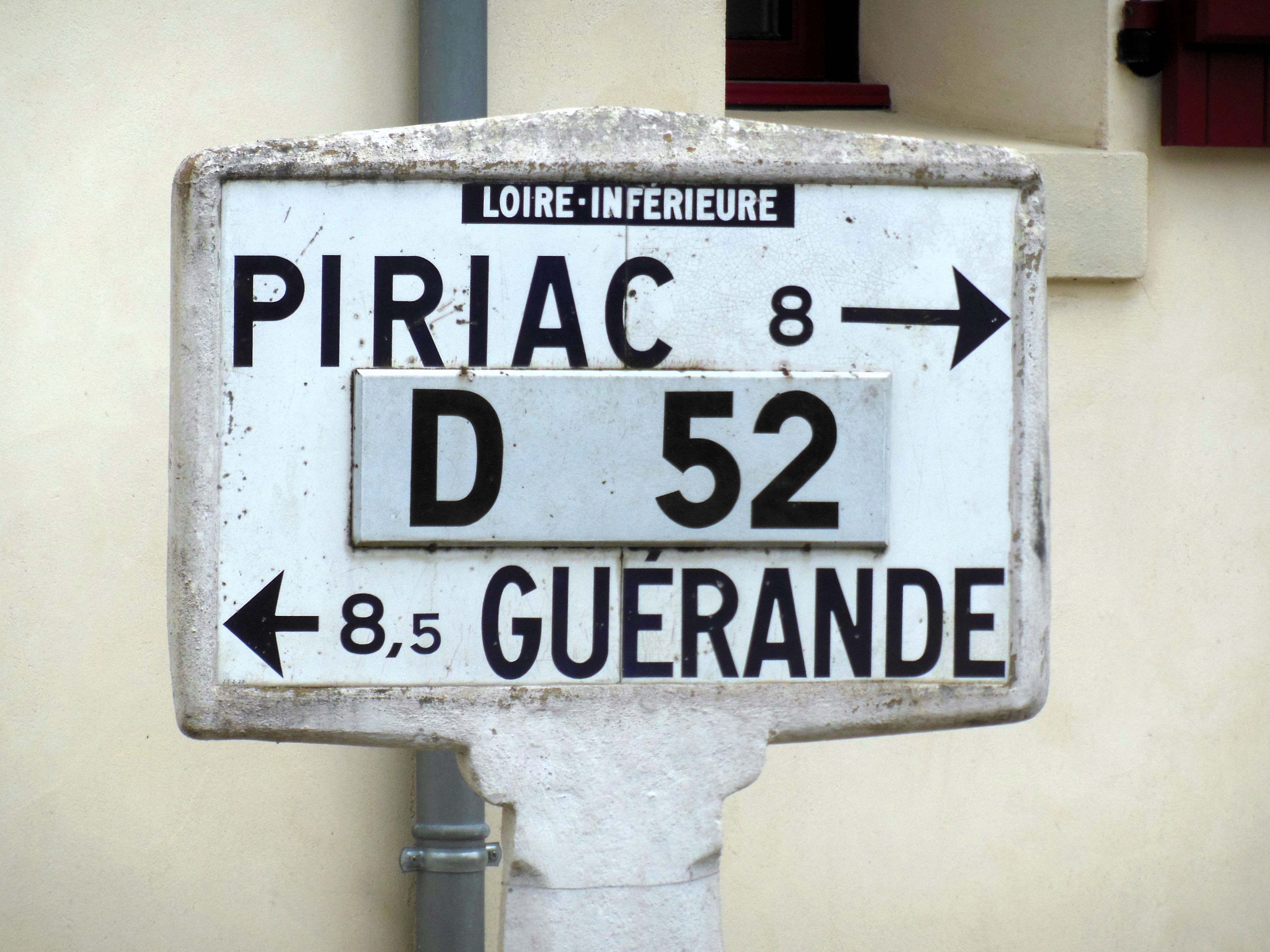 Panneau de signalisation Michelin sur la route départementale 52 à Mesquer (Loire-Atlantique), indiquant les directions de Guérande et de Piriac-sur-Mer